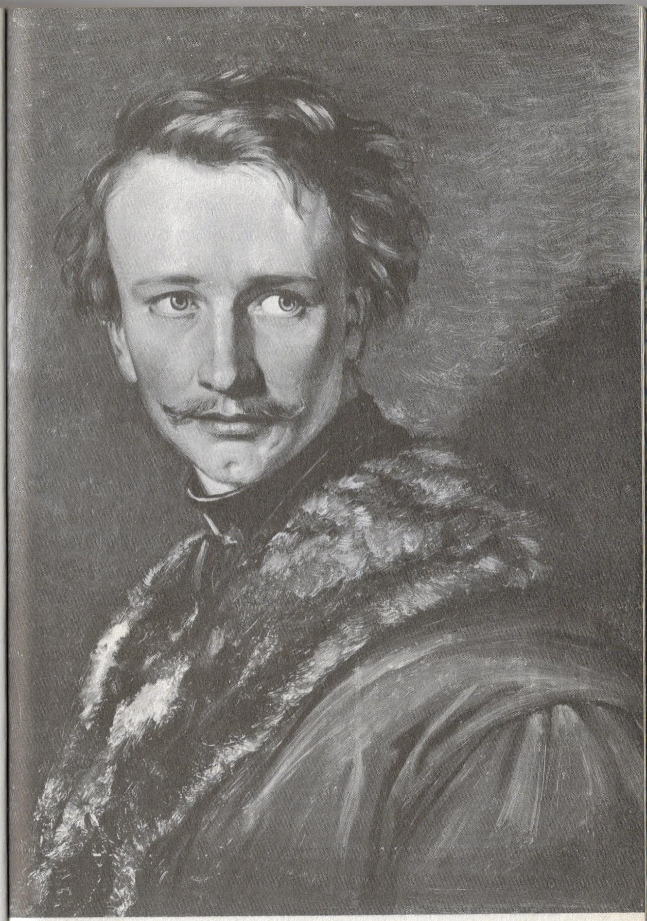 The painter Christian Ernst Bernhard Morgenstern (1805-1867), Christian Morgensterns grandfather